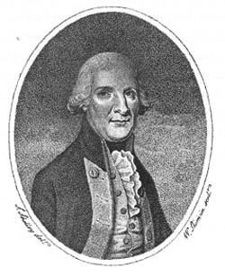 Lieutenant John Shortland (1769 - 1810)